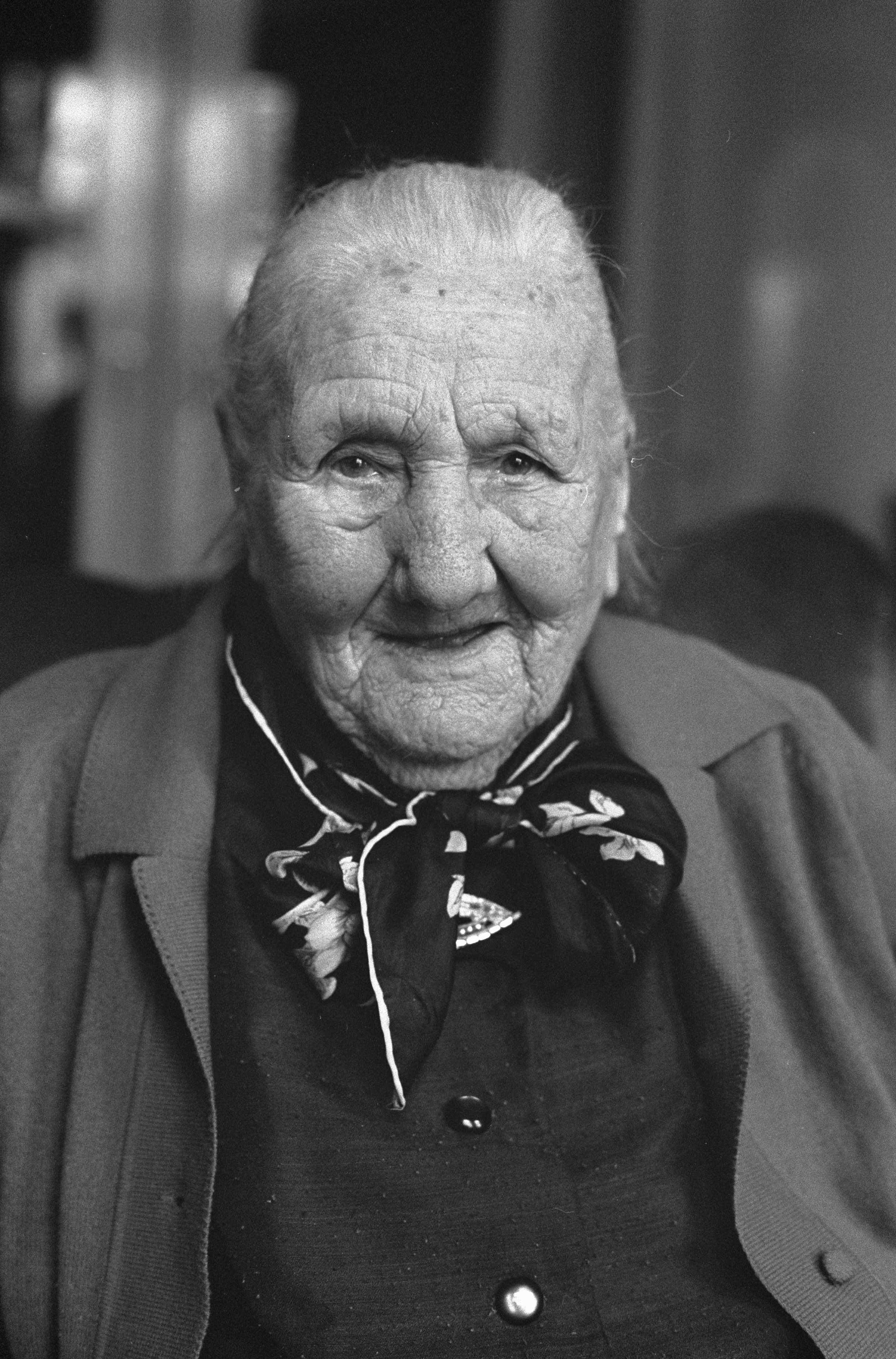 Collectie / Archief : Fotocollectie Anefo Reportage / Serie : De oudste inwoonster van Nederland, mevrouw J. Leeuwenburg-Hordijk, wordt 25 januari aanstaande 107 jaar Beschrijving : Een portret van mevrouw Leeuwenburg-Hordijk Datum : 15 januari 1974 Locatie : Nederland Trefwoorden : bejaarden, portretten Persoonsnaam : Leeuwenburg-Hordijk, J Fotograaf : Fotograaf onbekend / Anefo Auteursrechthebbende : Nationaal Archief Materiaalsoort : Negatief (zwart/wit) Nummer archiefinventaris : bekijk toegang 2.24.01.05 Bestanddeelnummer : 926-9449